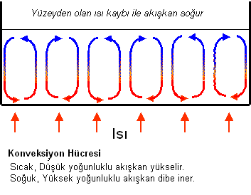 Kaynak: wiki-türkçeleştirilmiş hali